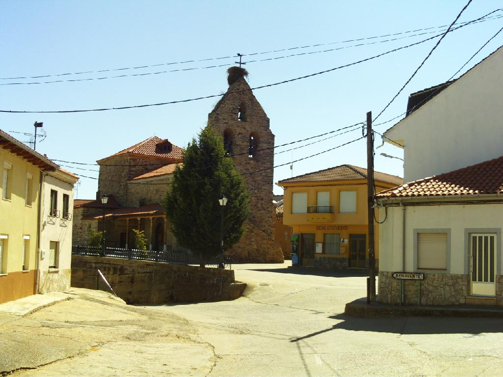 Plaza Mayor